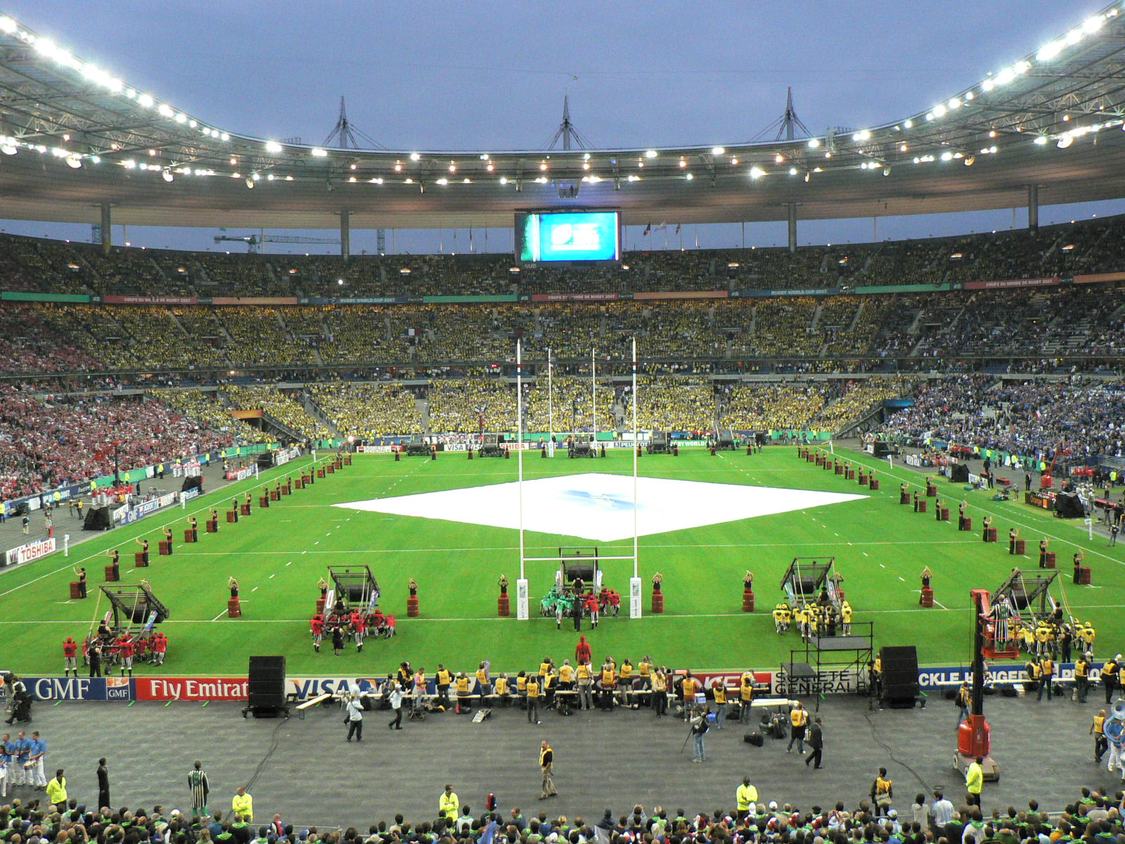 Cérémonie d'ouverture - Coupe du Monde de Rugby 2007